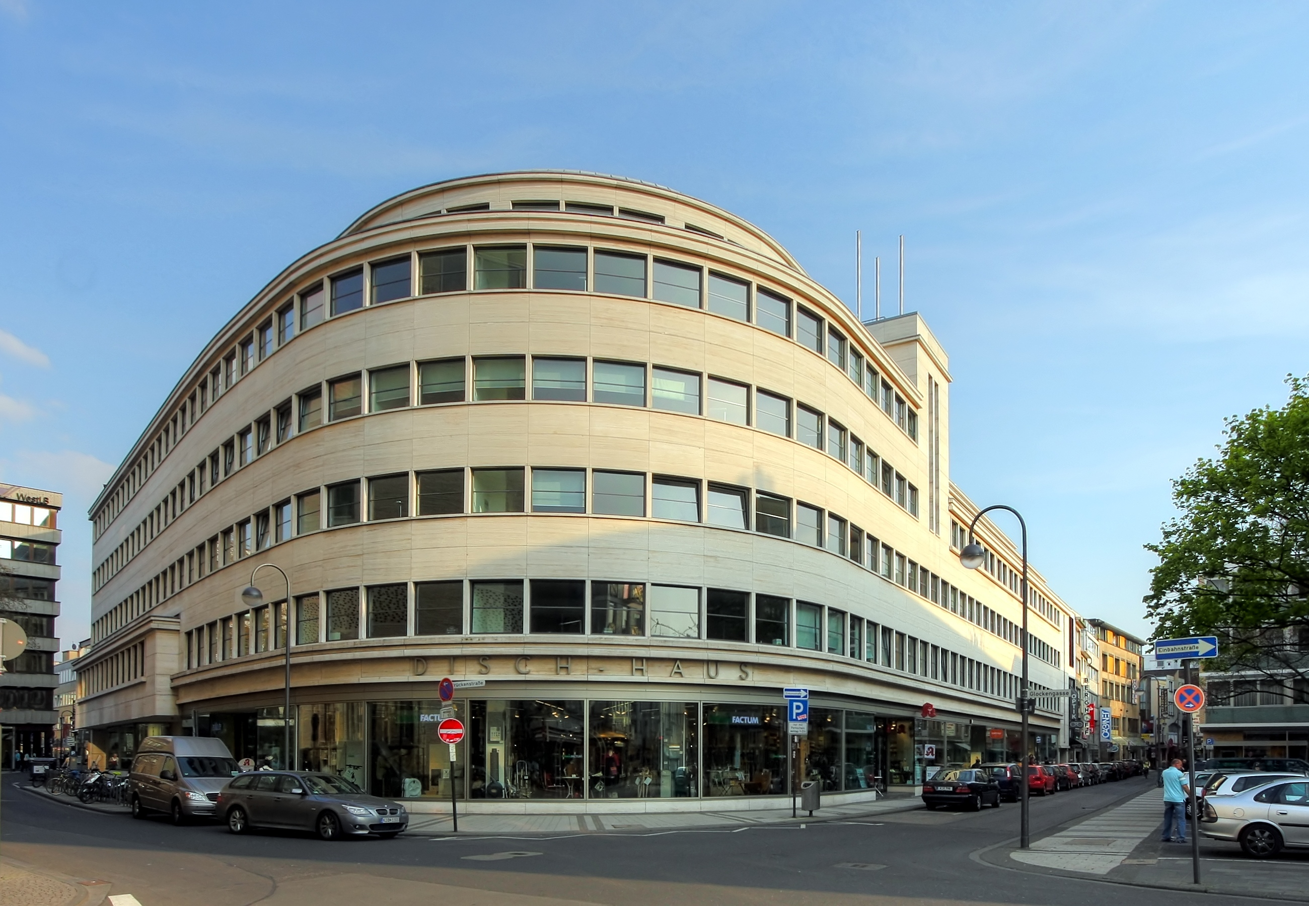 Disch-Haus in Köln, Brückenstraße/Ecke Herzogstraße. Architekt: Bruno Paul, Baujahr: 1930